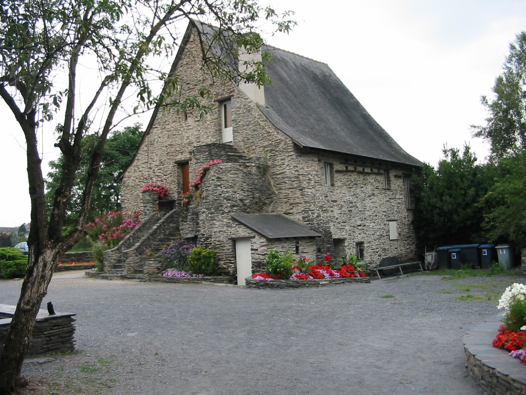 Le musée de l’ardoise à Trélazé (Maine-et-Loire, France).